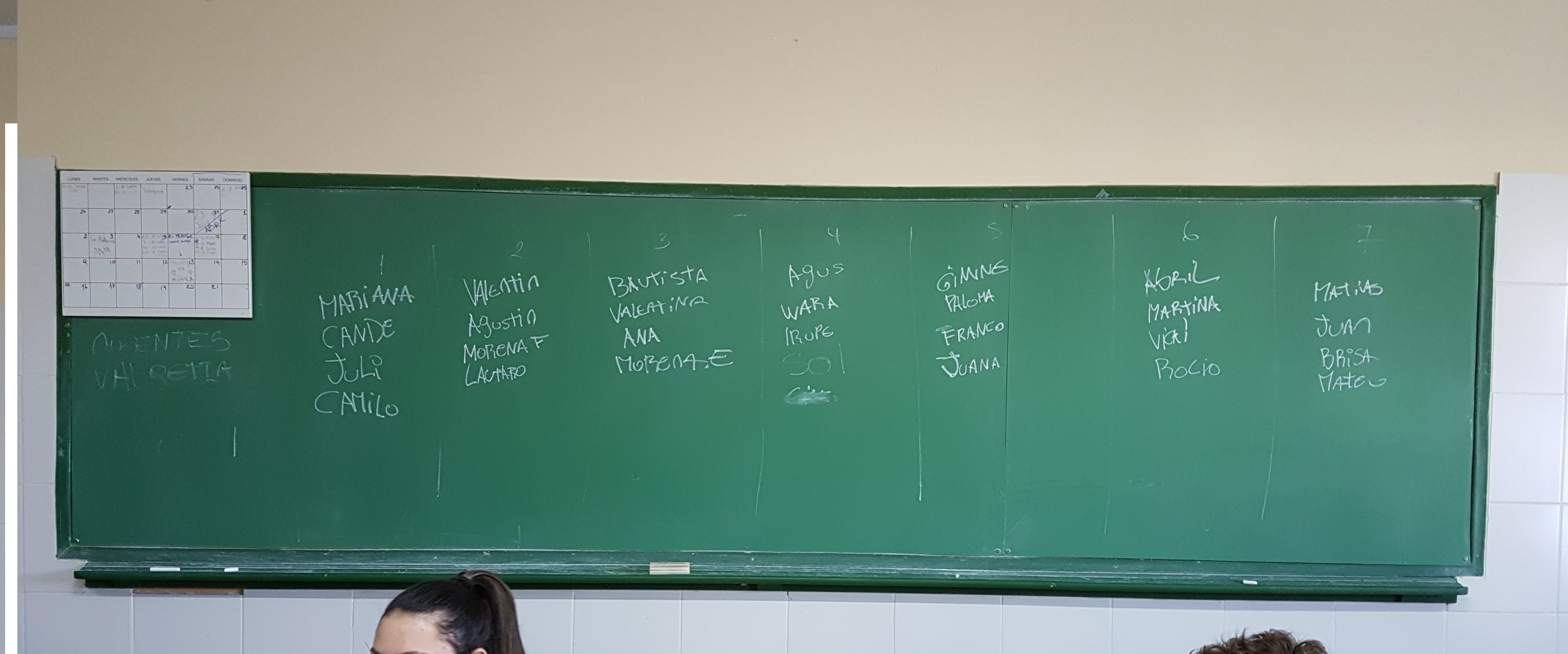 gran pizarrón verde en un aula